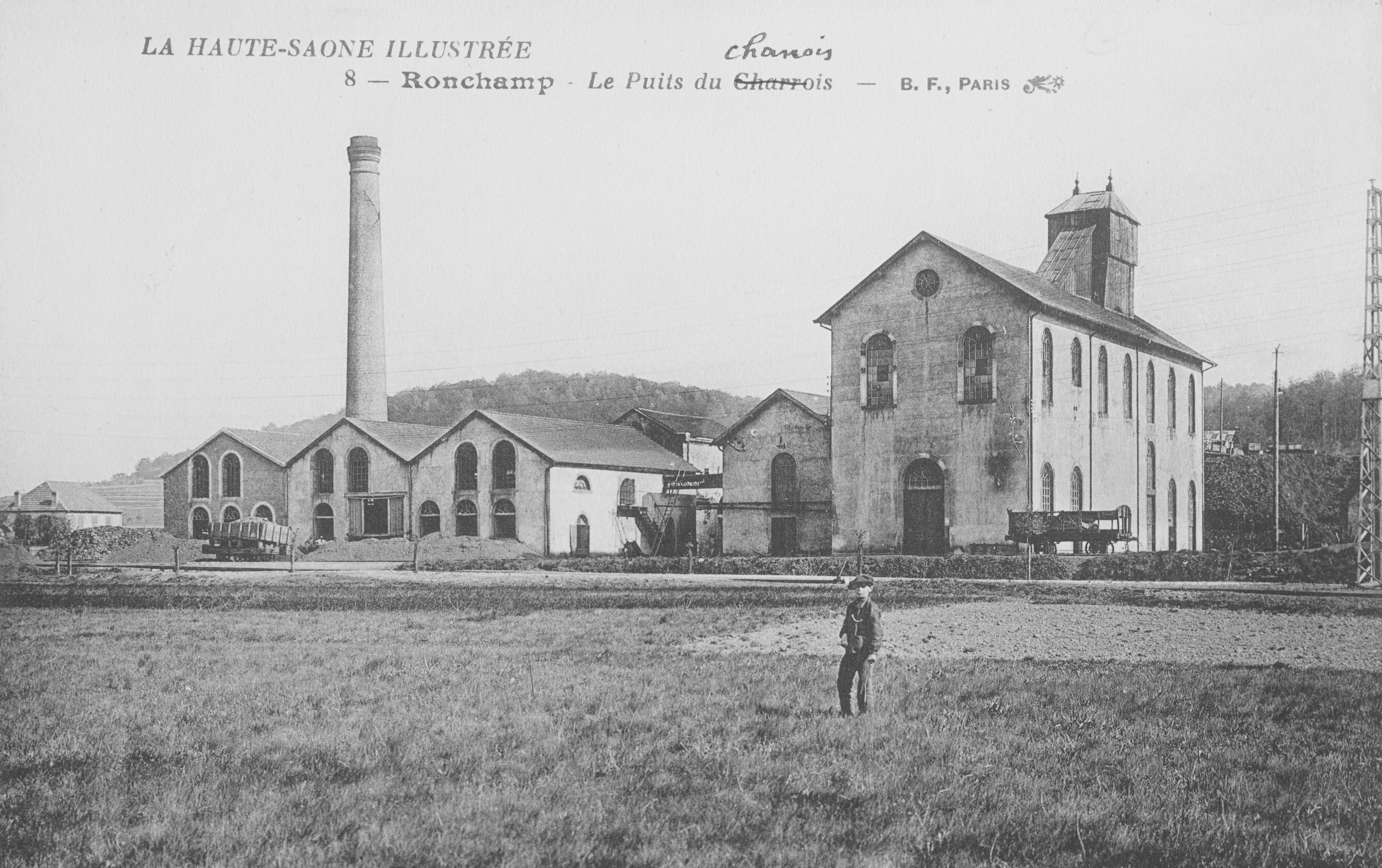 Le puits du Chanois des houillères de Ronchamp.